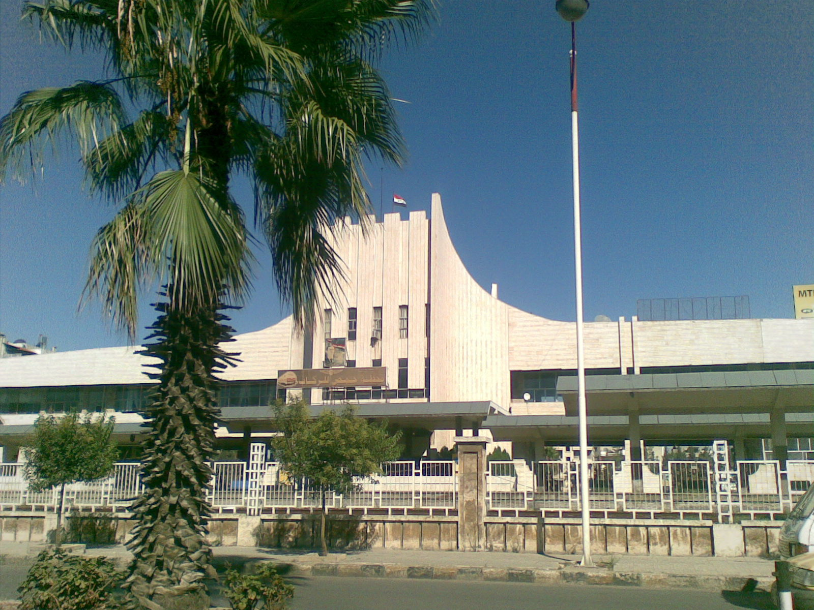 محطة القطارات